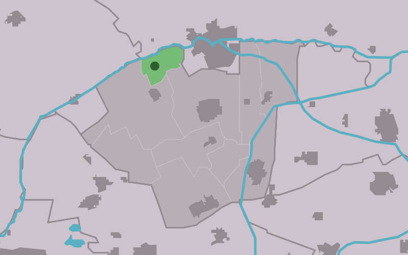 Kaartsje fan himrik fan Sibrandahûs